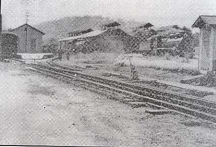 Primeiros registros da estação Guapimirim em preto e branco.